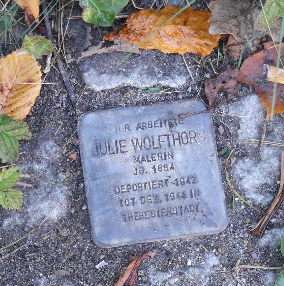 Stolperstein für Julie Wolfthorn in Vitte, Gemeinde Insel Hiddensee